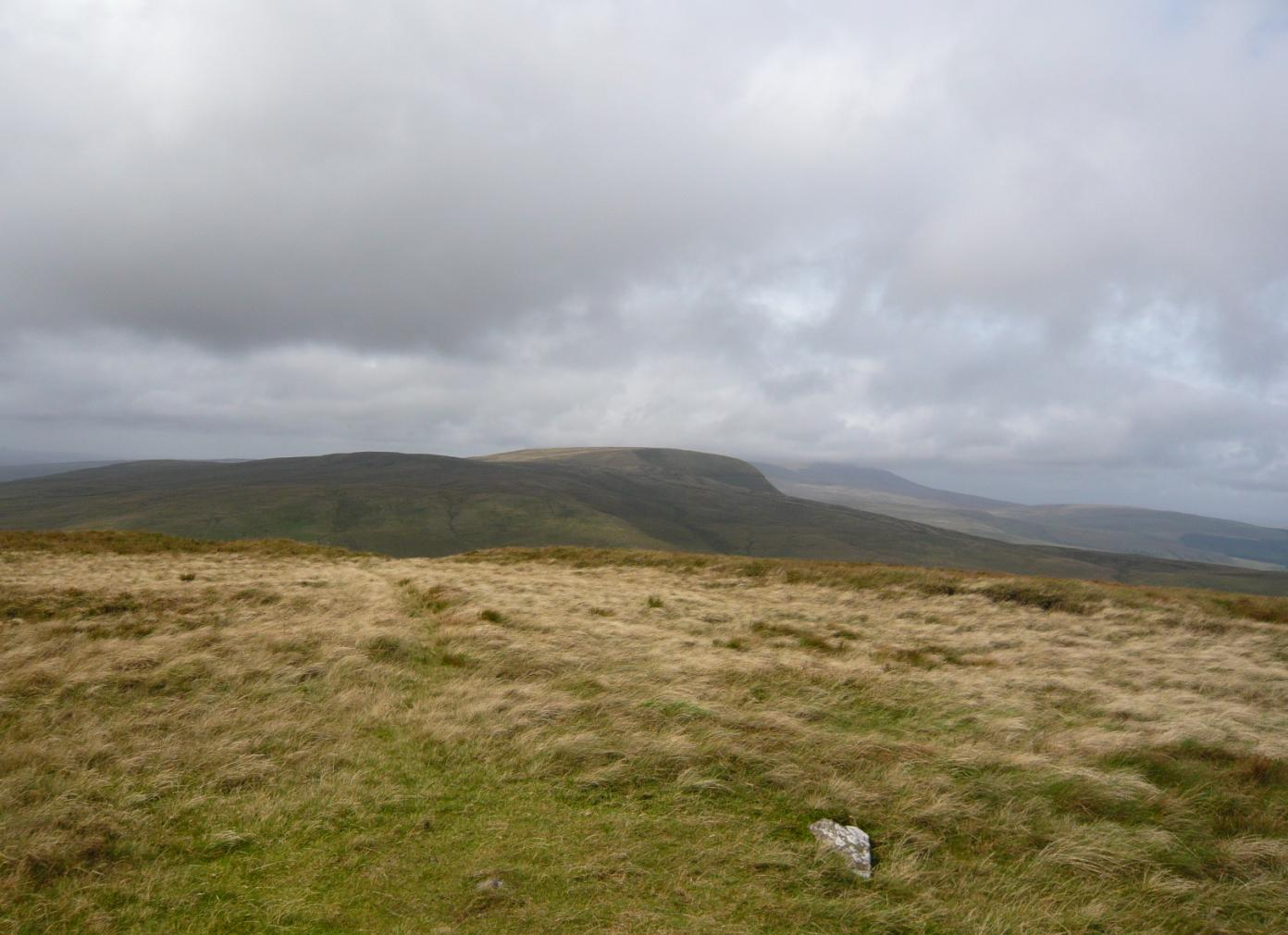 fan fraith